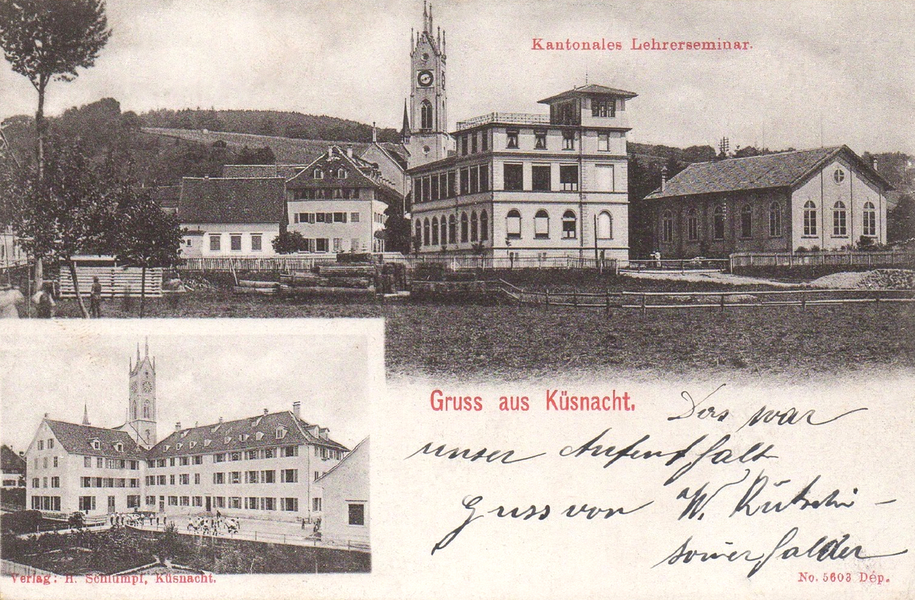 Küsnacht (Suisse), Lehrerseminar, avant 1905. École normale d'instituteurs.